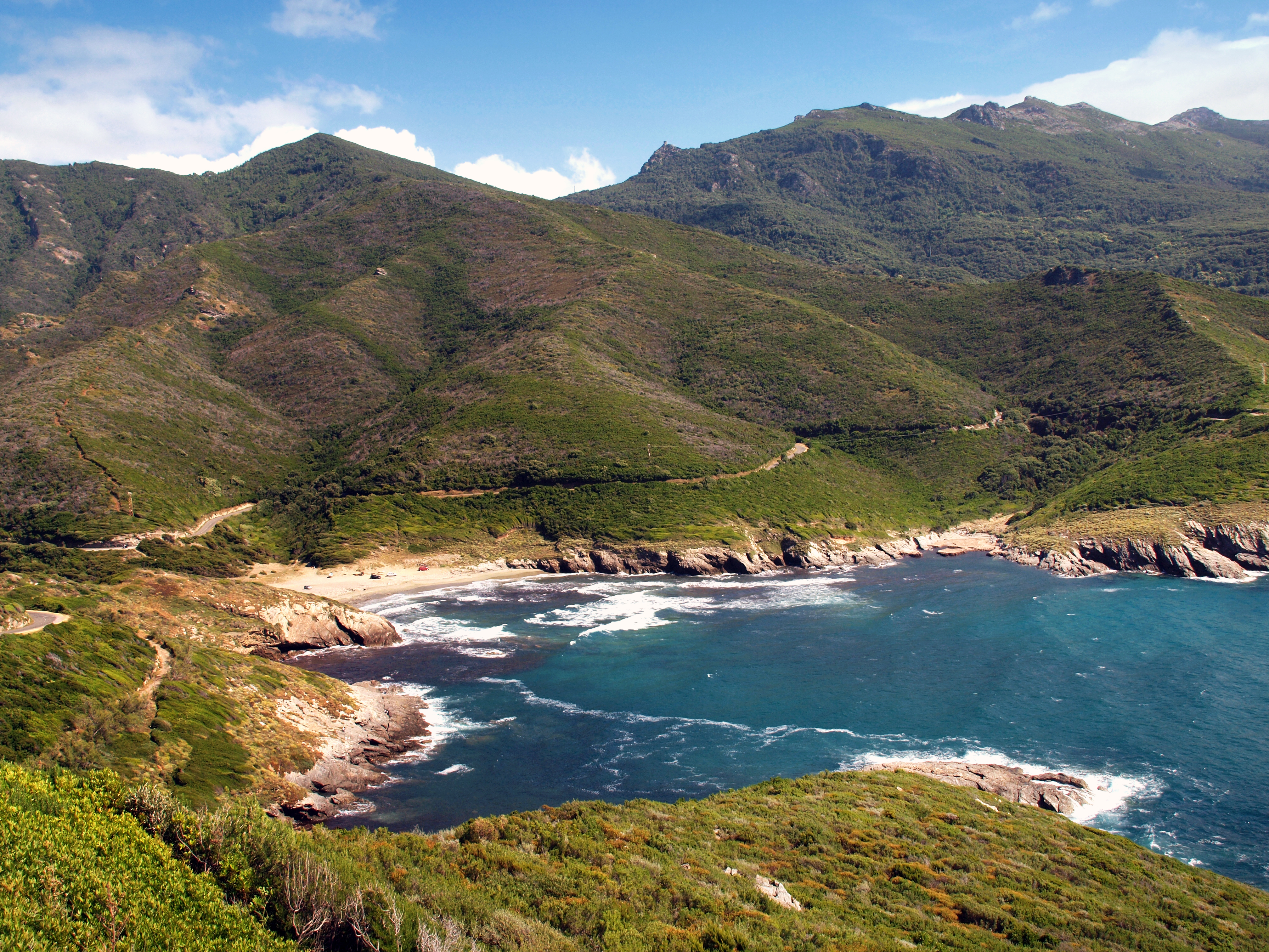 Morsiglia (Corse) - Golfe d'Alisu